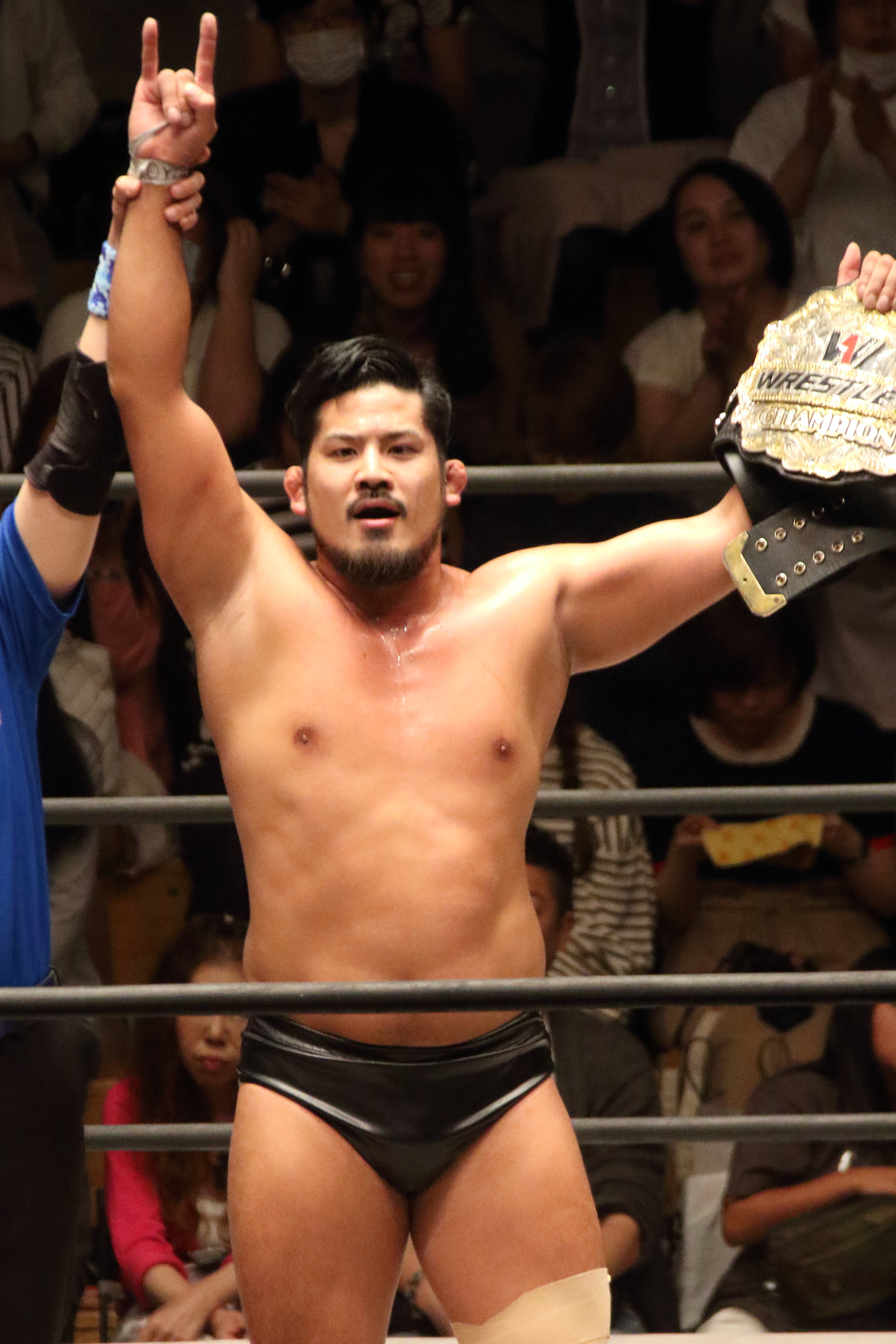 ＠後楽園ホール